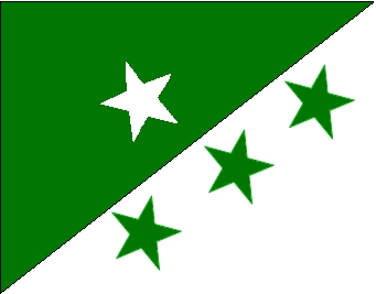 A bandeira foi criada pela Professora Cybele de Almeida Cardoso por ocasião dos festejos da "Semana da Cidade" em 20 de abril de 1975. As cores Verde: Representa a agricultura e apecuária, principais atividades da economia do Município. Branca: Representa a paz que sempre existiu entre os habitantes do Município. As estrelas: Branca - Representa o Distrito Sede Amargosa. Verde - Representa os distritos de Diórgenes Sampaio, Itachama e Corta-Mão.